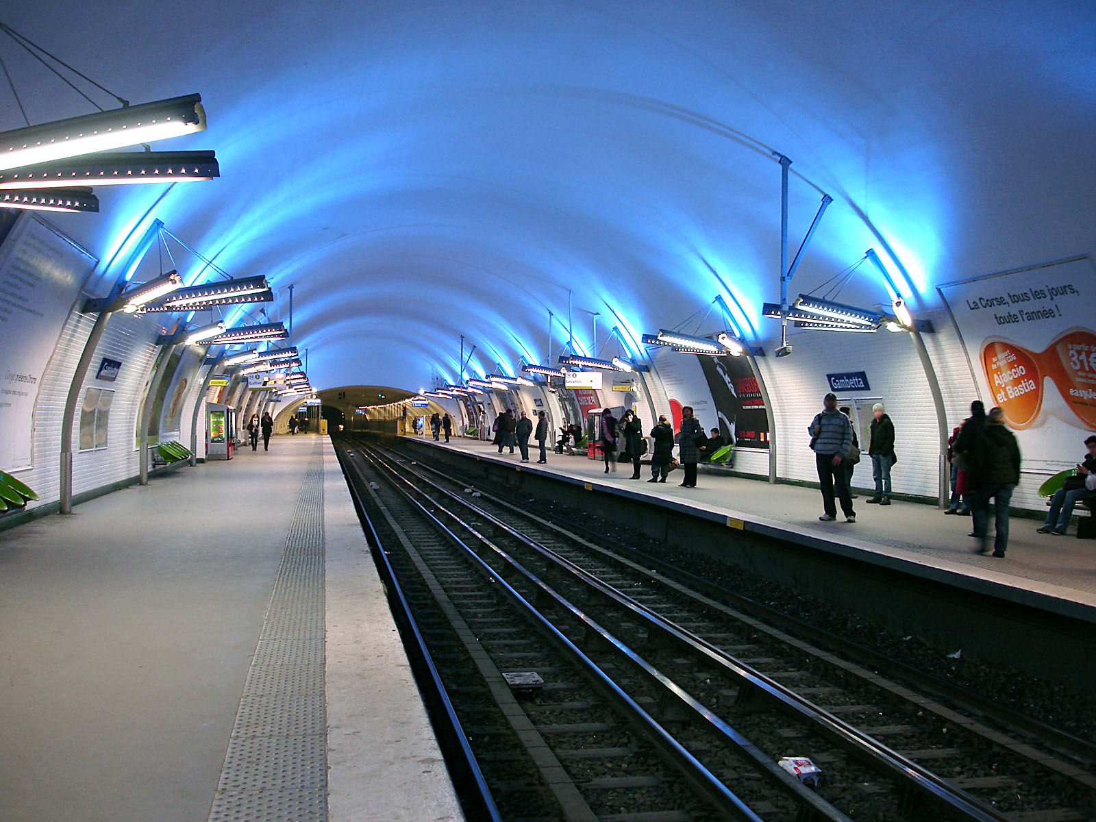 La station Gambetta de la ligne 3 du métro de Paris, France.